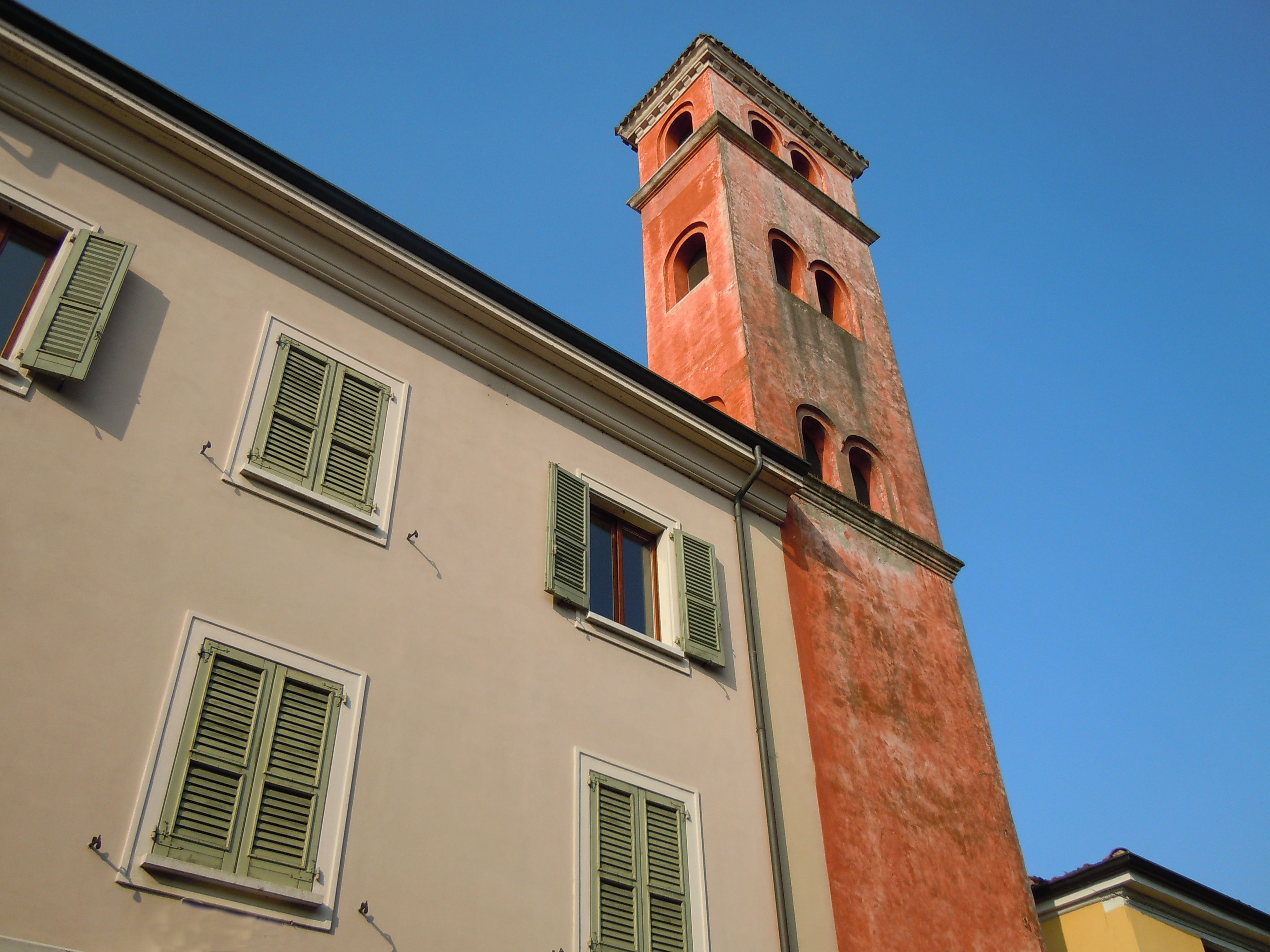 Castel Goffredo, Chiesa di S. Maria del Consorzio, il campanile.